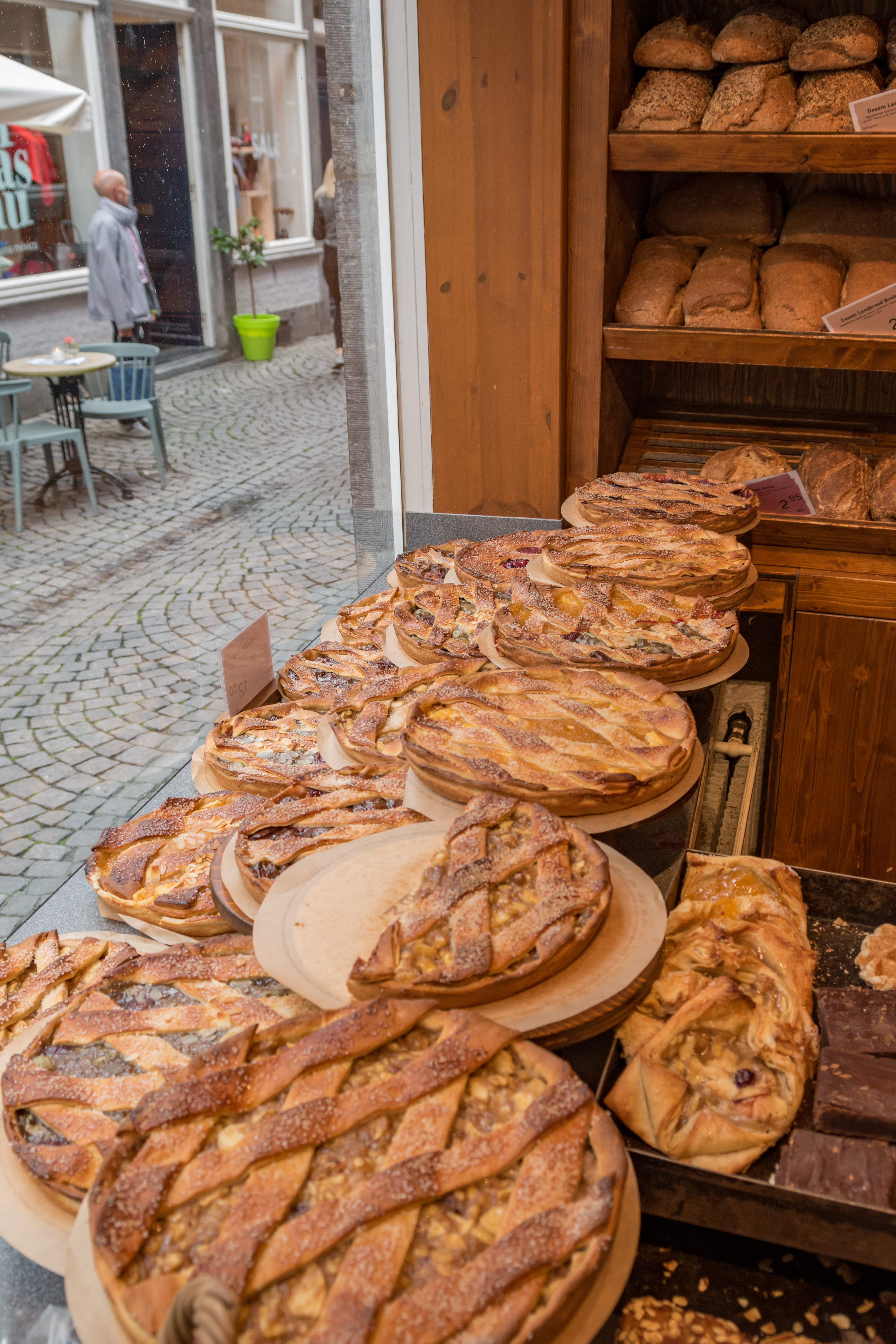 Limburger Vlaai Kuchen Maastricht